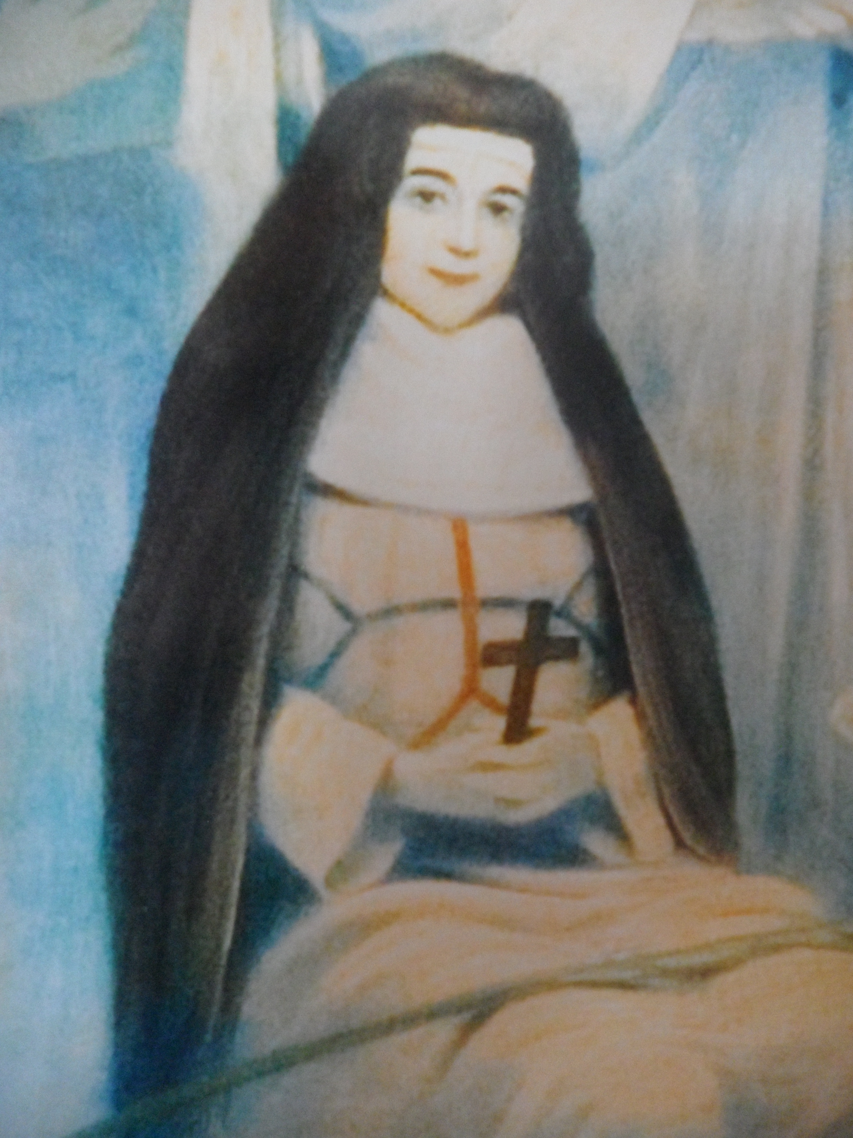 Particular del lienzo Mariano de san José y compañeros mártires. Convento de San Carlo alle Quattro Fontane.